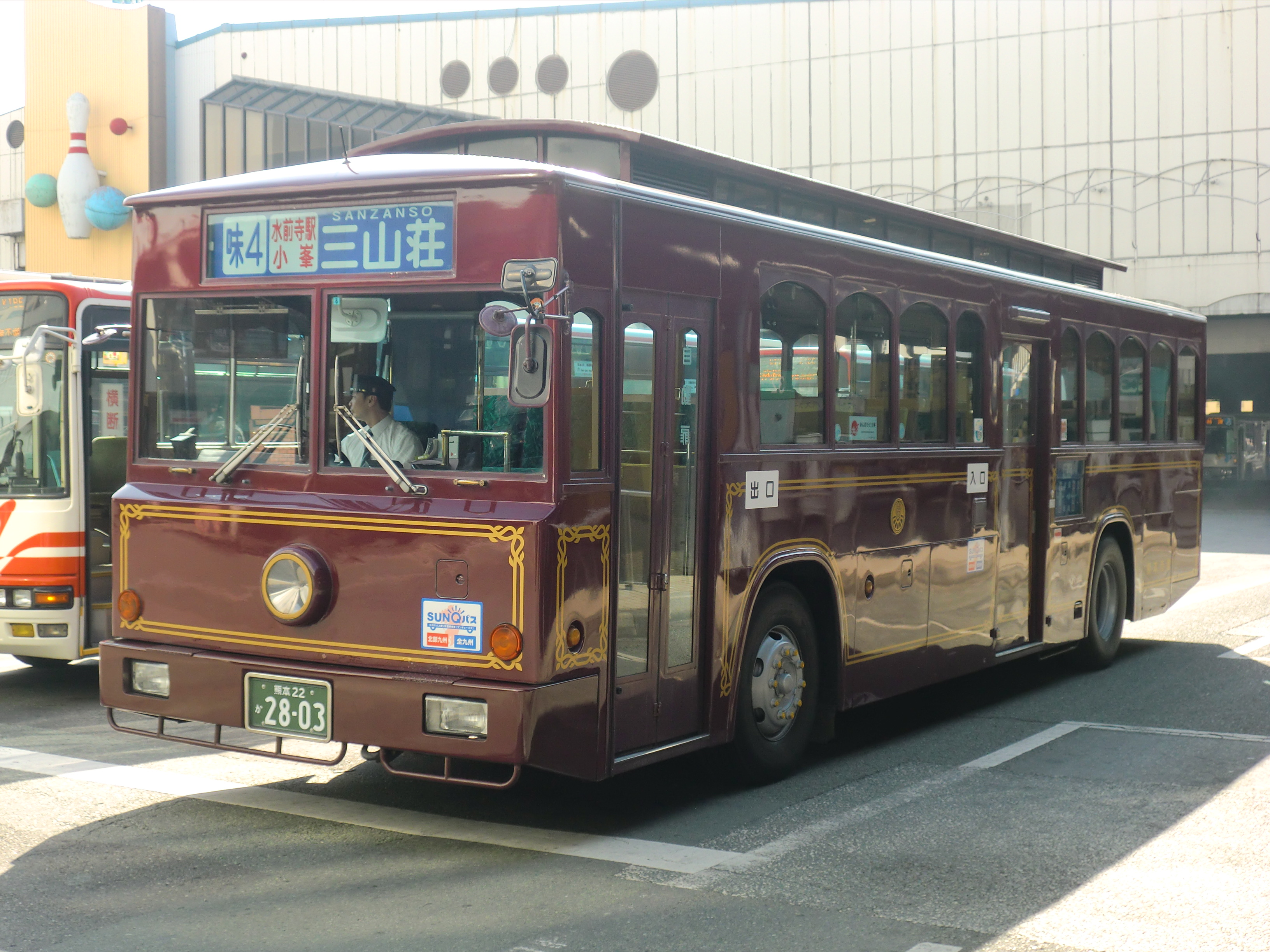 熊本市交通局味4番